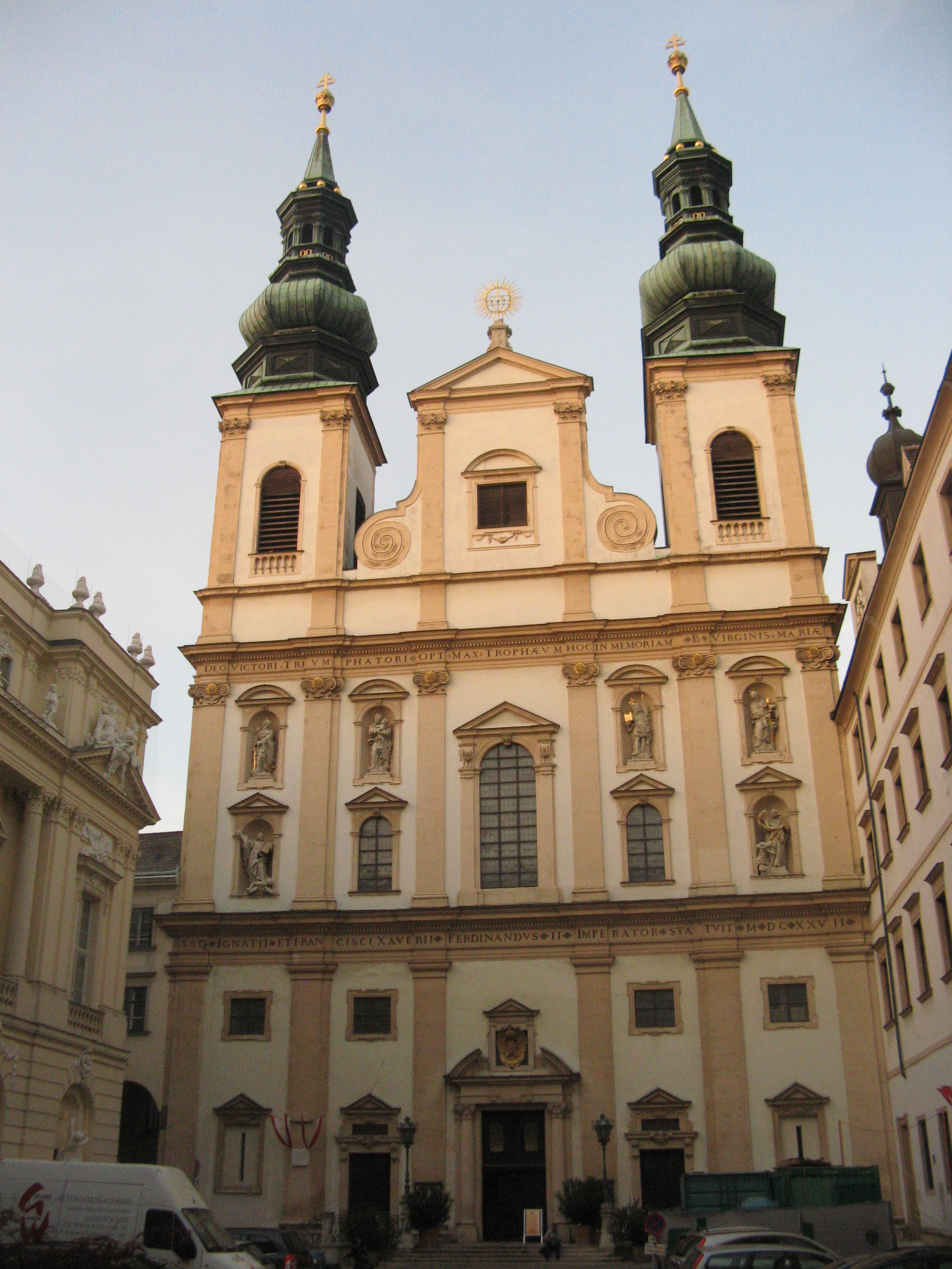 Jesuitenkirche, Dr.-Ignaz-Seipel-Platz 1, Wien-Innere Stadt